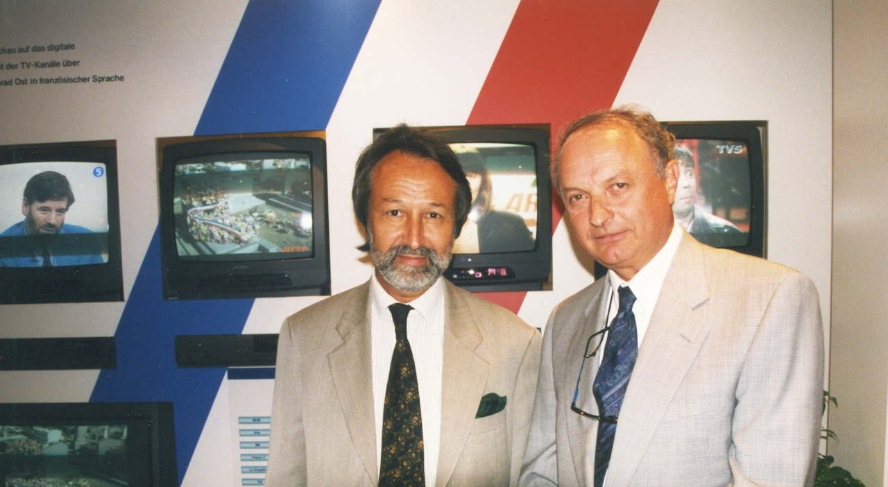 Le président de la chaîne Arte et le directeur général d'Eutelsat lors du lancement du premier bouquet de télévision numérique français par satellite en 1995. Il préfigure le bouquet TPS.